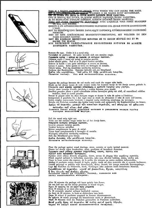 Gebrauchsanweisung für ein "Braddock"-Brandpaket